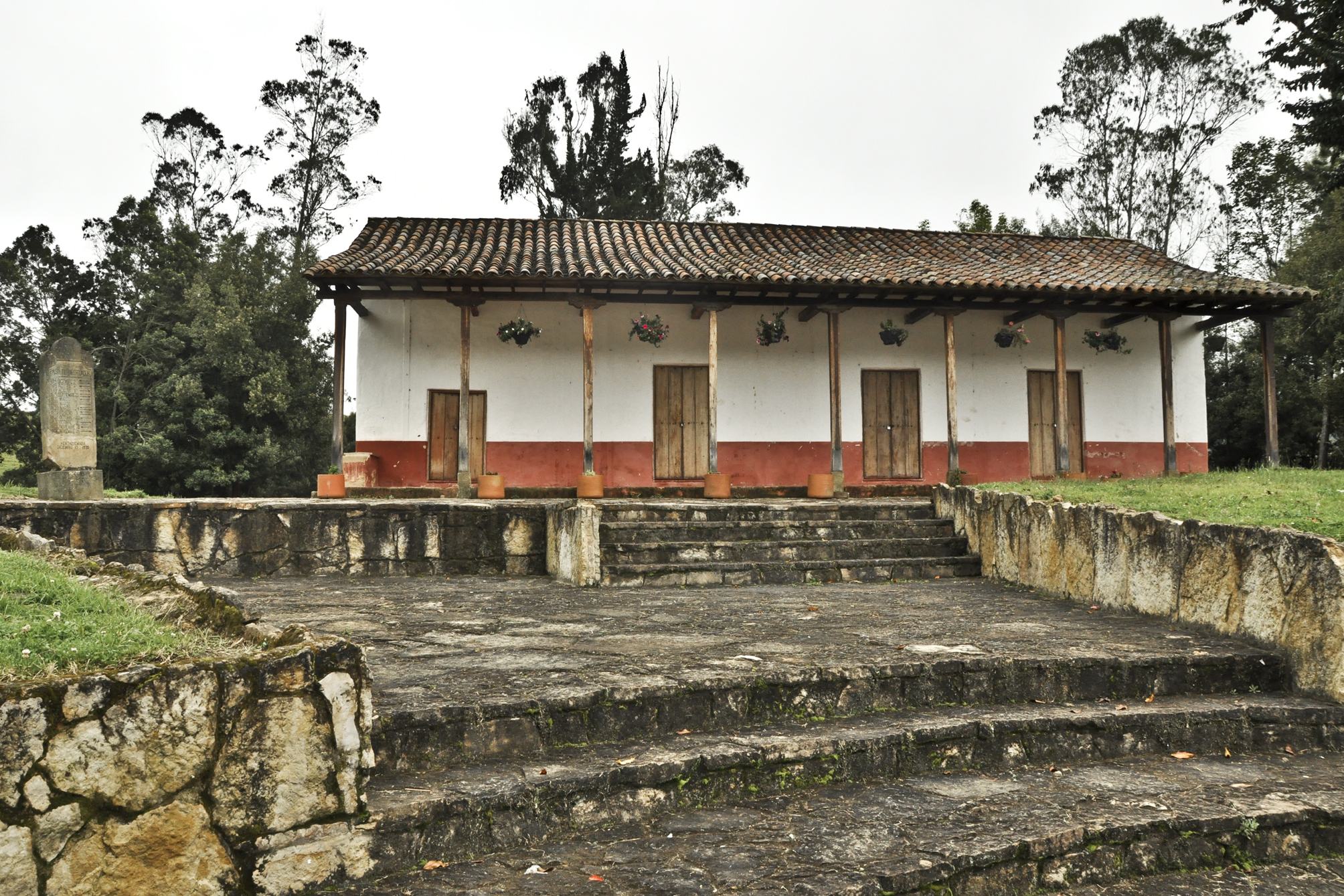 Casa histórica de Ventaquemada